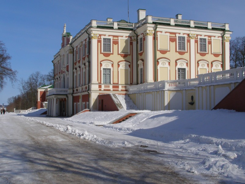 Kadrioru loss.